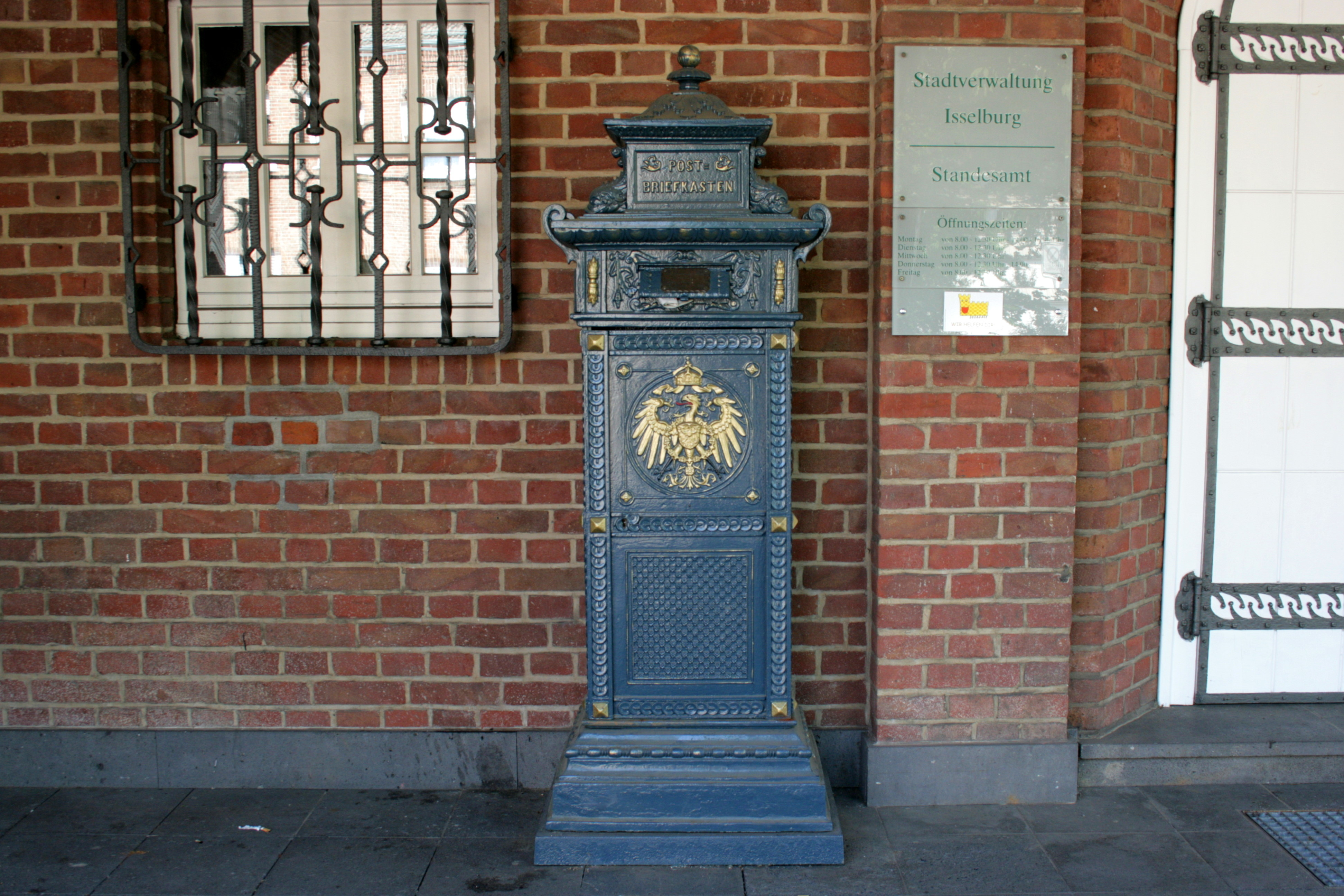 Rathaus Isselburg an der Minervastraße in Isselburg